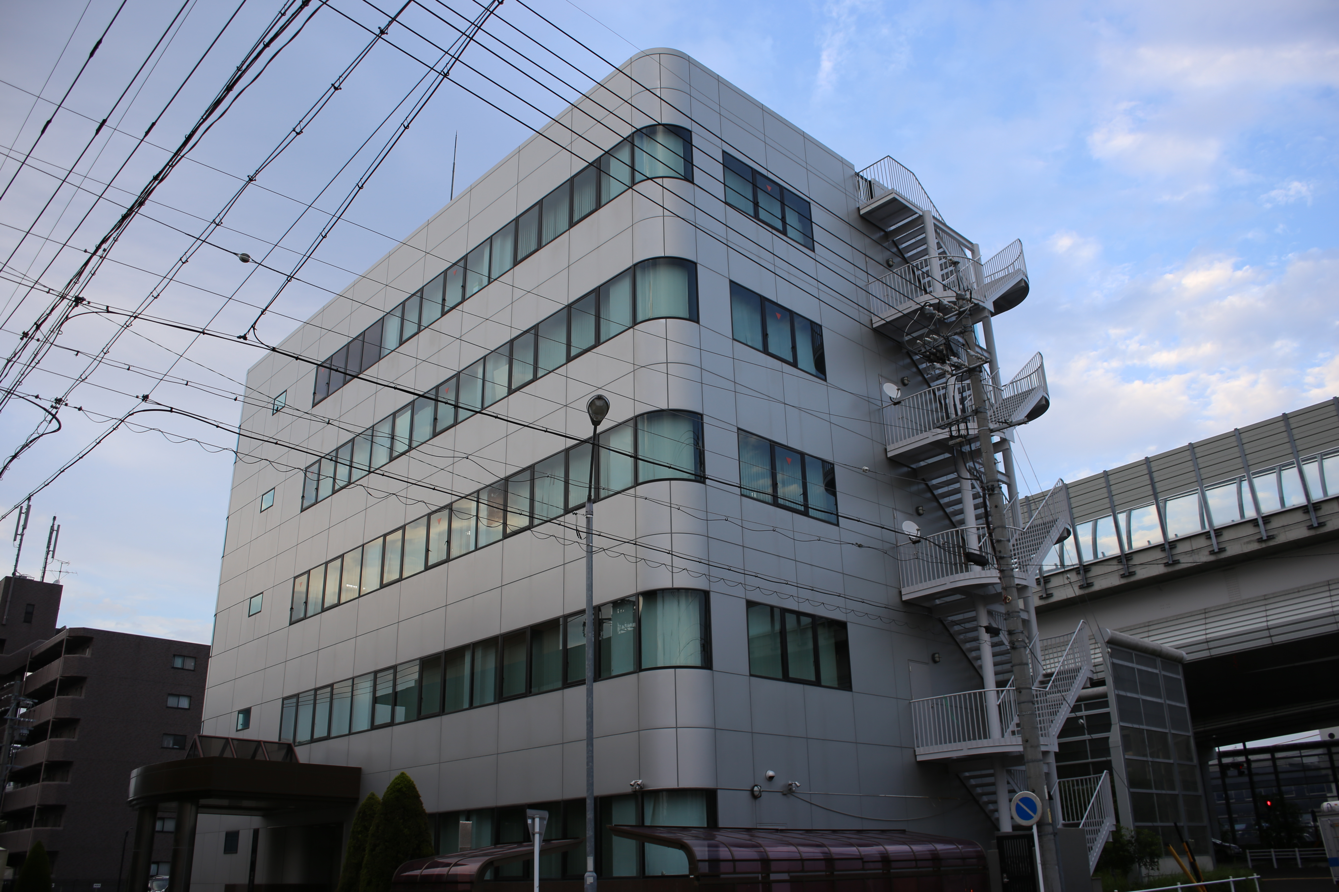 名古屋市名東区一社の明倫ゼミナール本社を南側公道西側より撮影